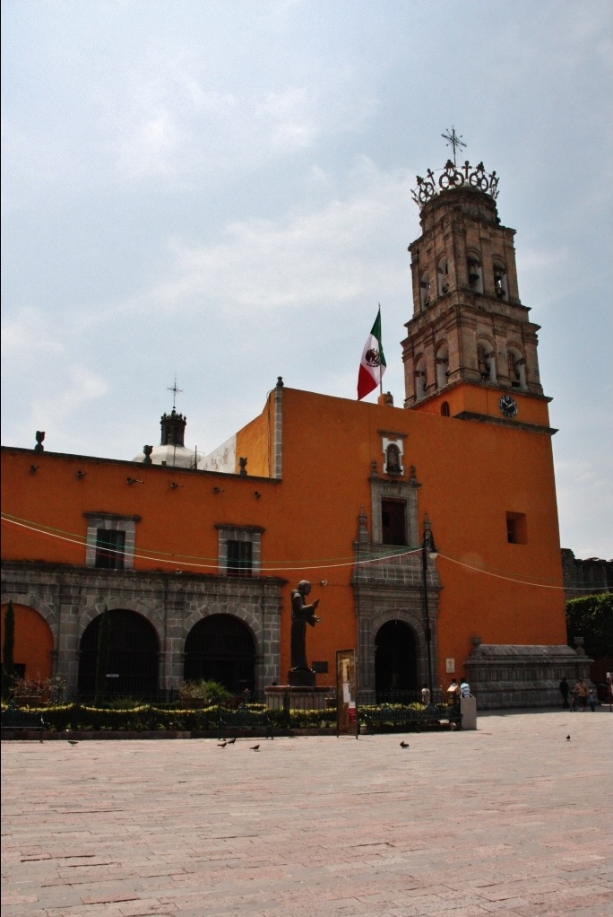 Francis of Assisi Church, Acambaro, Guanajuato State, Mexico